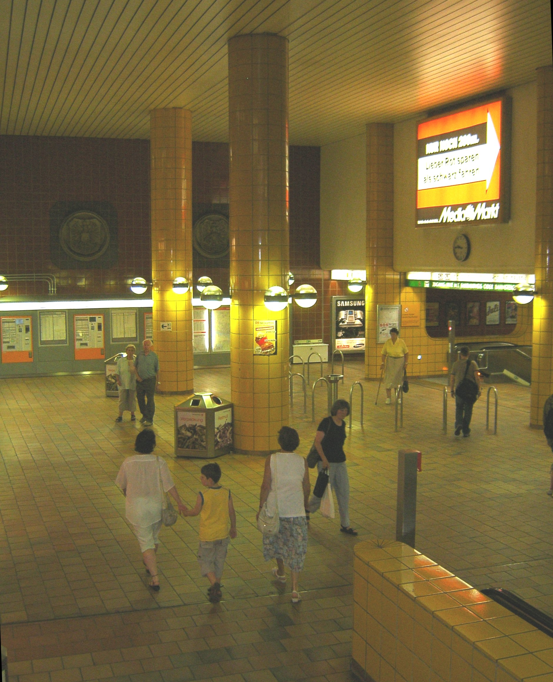 Bahnhof Hamburg-Harburg, Eingang zur S-Bahn-Station.